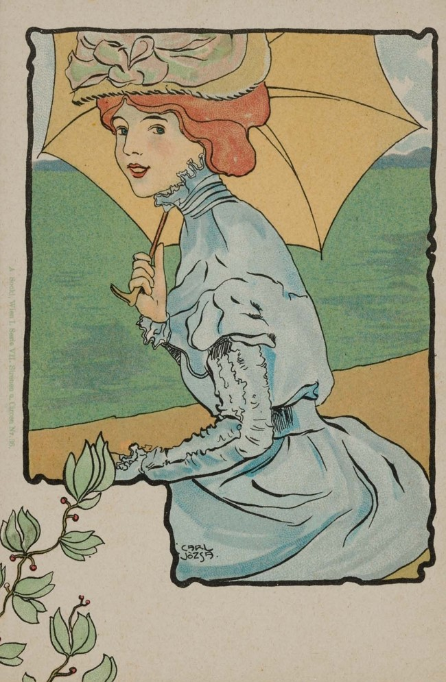 Carl Józsa - Sirenen und Circen Nr. 36. (Series: Sirenen und Circen. Women as sirens and other mythical creatures. Flora borders and patterns